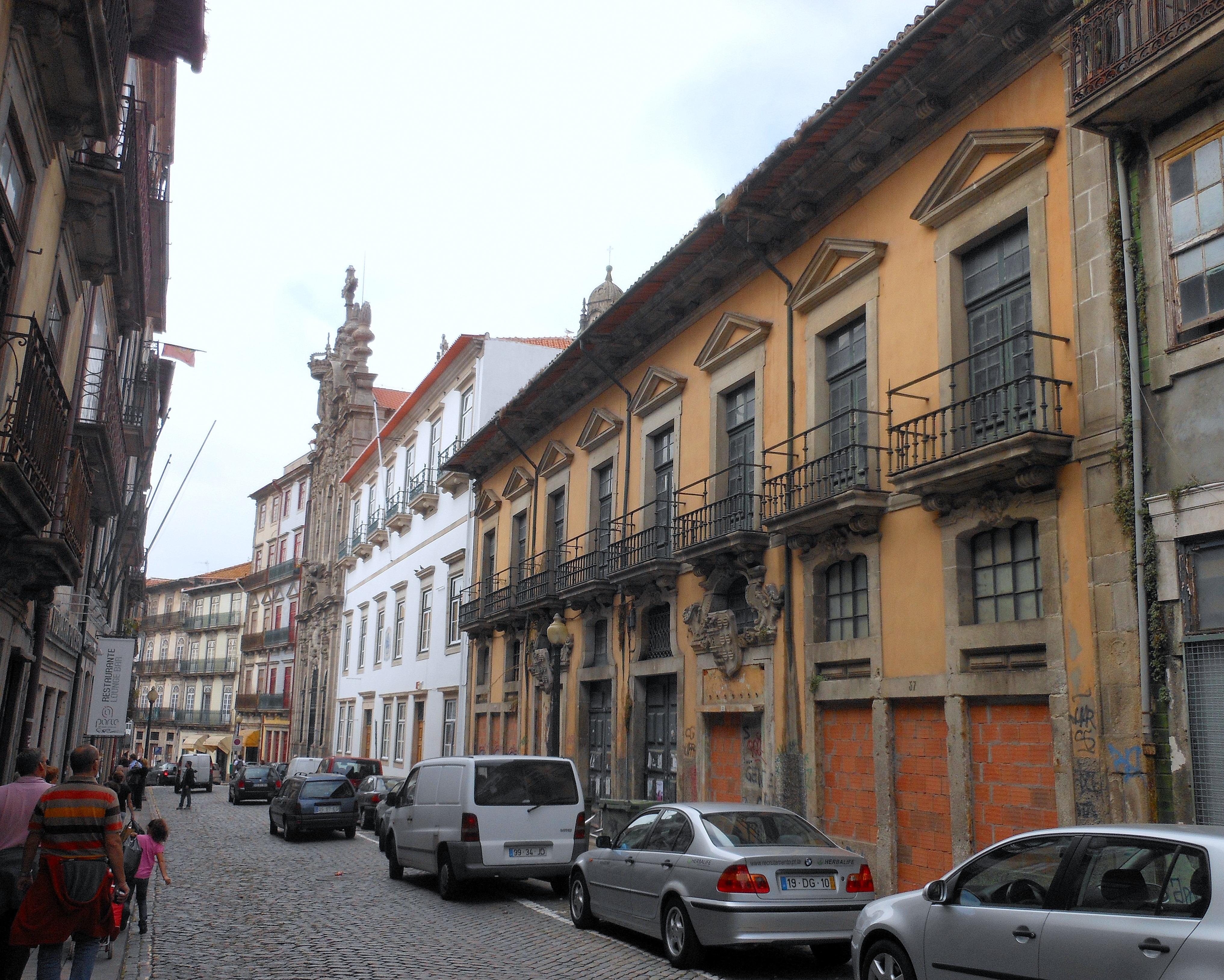 Casa dos Ferrazes Bravos ou Casa dos Maias, Porto, Portugal. This file was uploaded for Wiki Loves Monuments in Portugal with the unique identifier 74300.